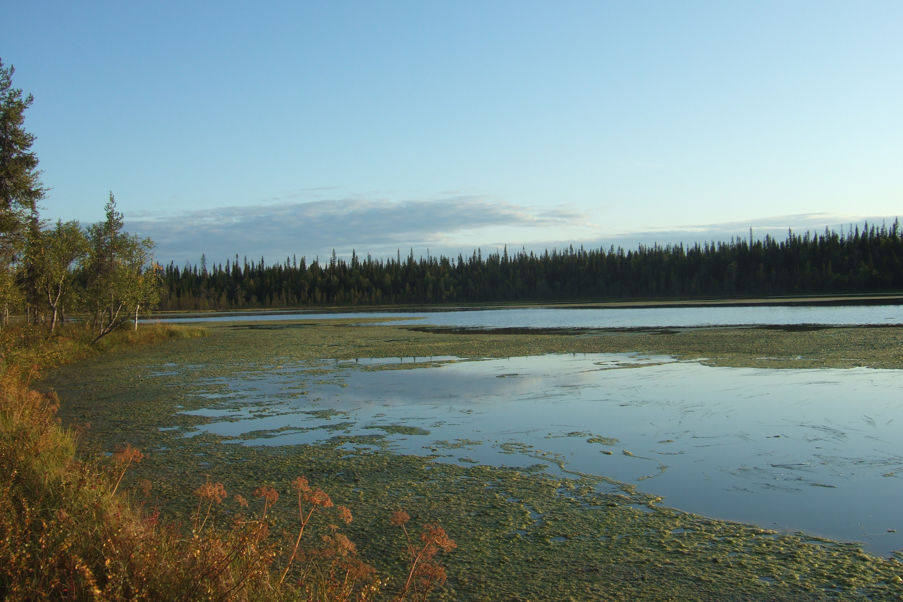 Kemijärvi aintzira, Lappi eskualdean